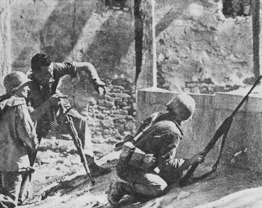 Soldati americani in azione tra le macerie di Salerno